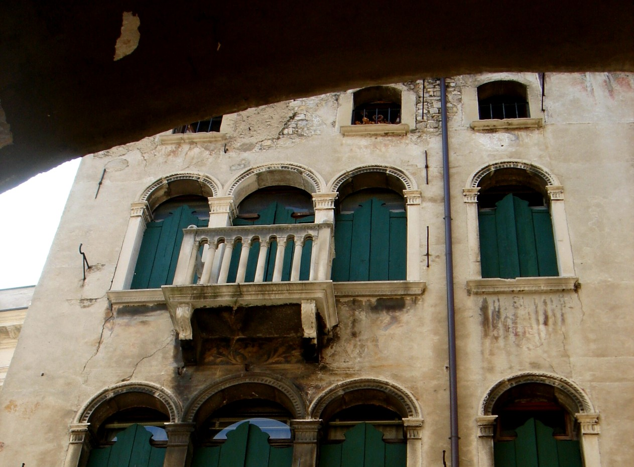 Serravalle di Vittorio Veneto (Treviso): trifora di Palazzo Sanfiori (XV sec.).